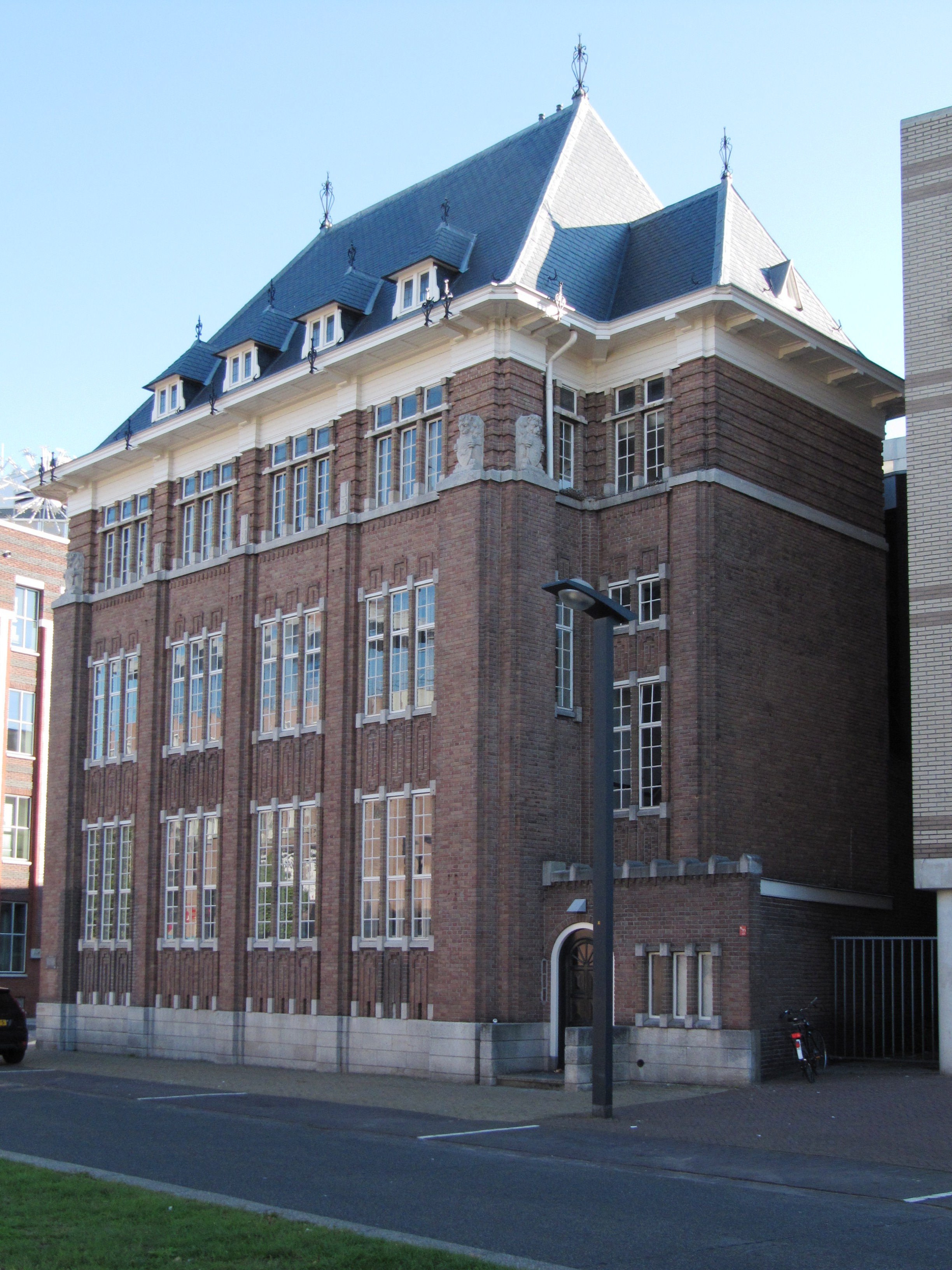 RM510614_-_Enschede_-_Piet_Heinstraat_4